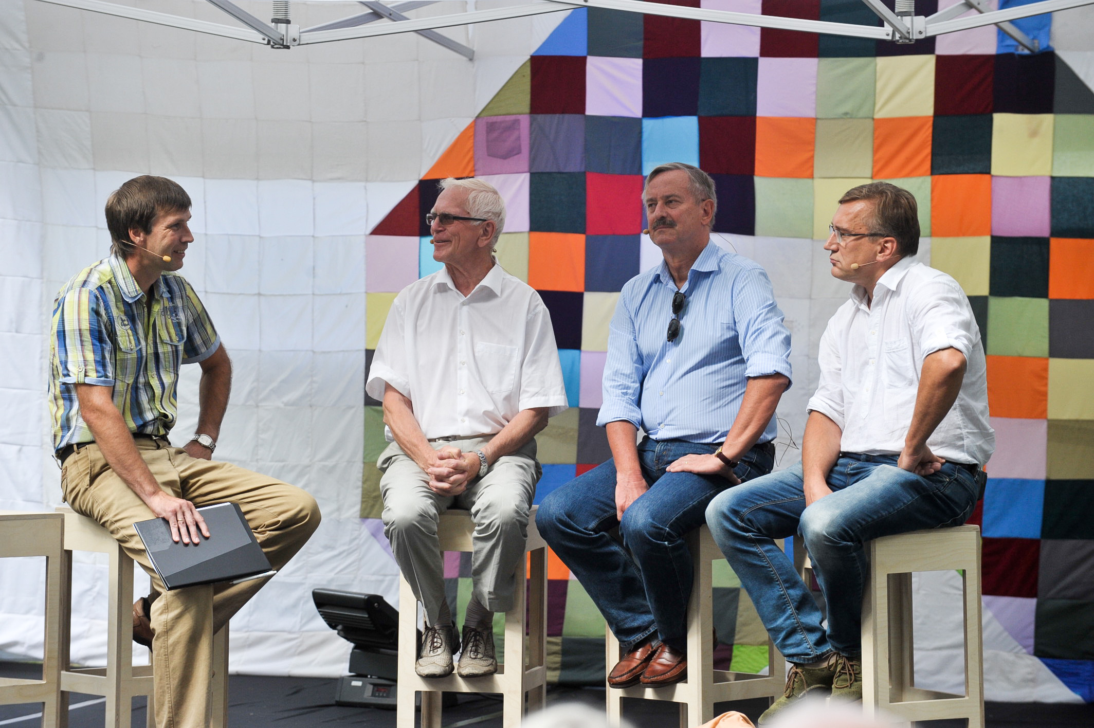 Arvamusfestival 2014: "Endised peaministrid, mida teeksime täna teisiti". Andres Tarand, Siim Kallas ja Juhan Parts.